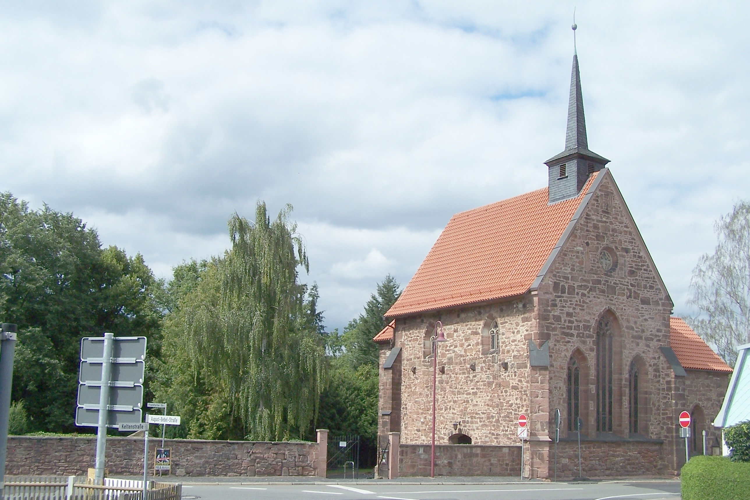 Ansichten und Details der Gottesackerkirche in Vacha.